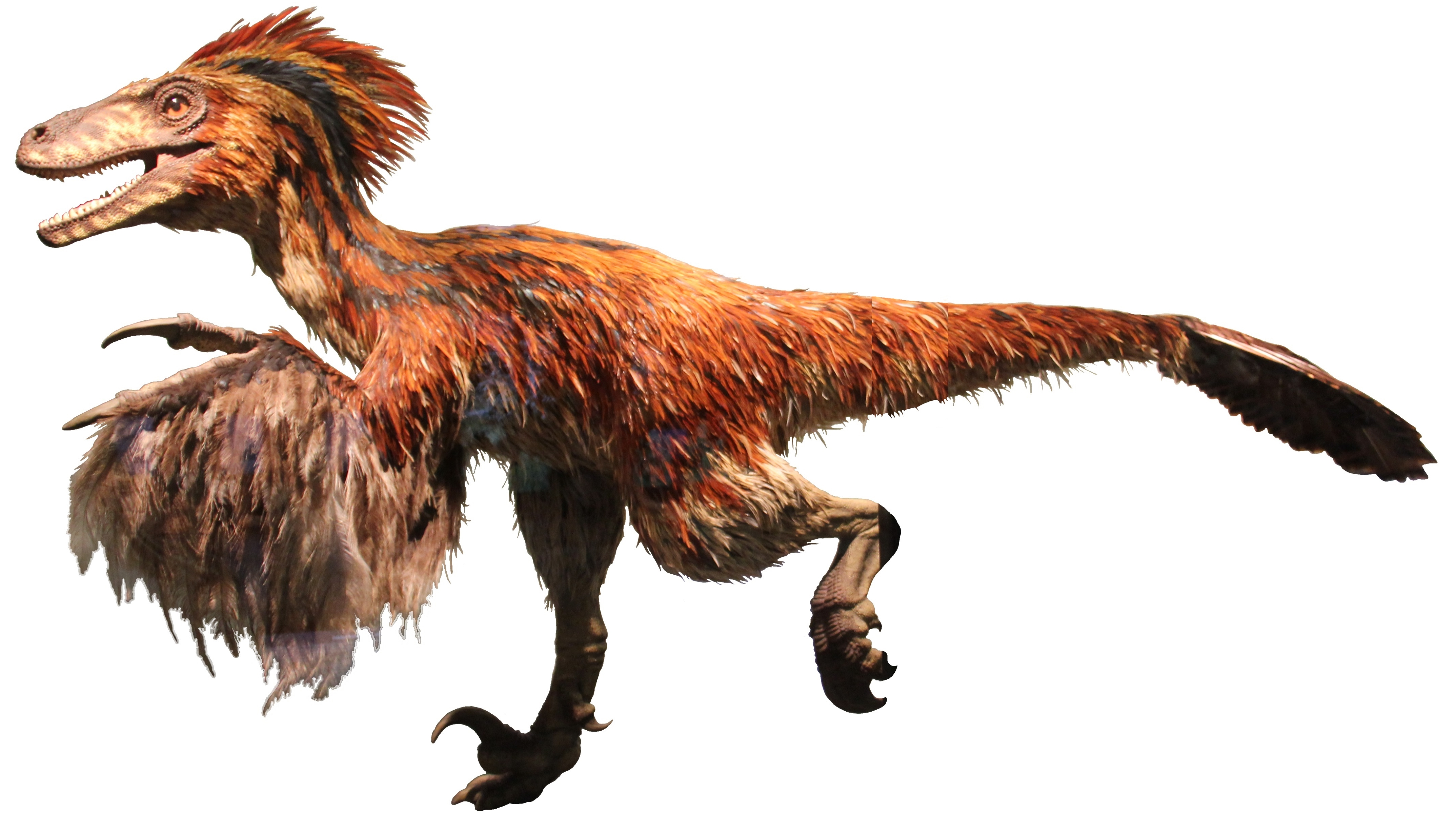 Naturhistorisches Museum Wien